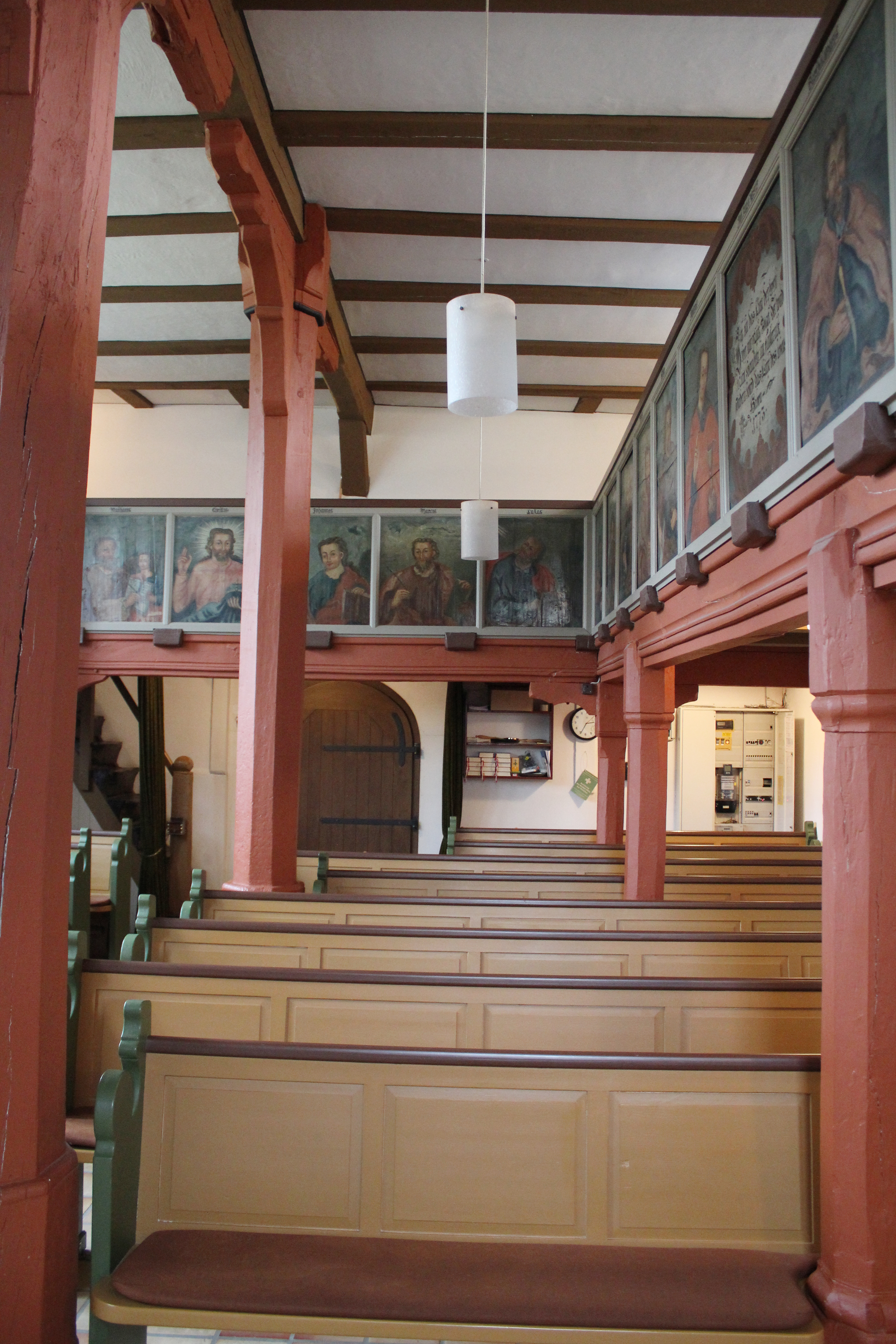 Evangelische Kirche Ilsdorf (ursprünglich Bernsfeld), Gemeinde Mücke, Vogelsbergkreis, Hessen, Deutschland